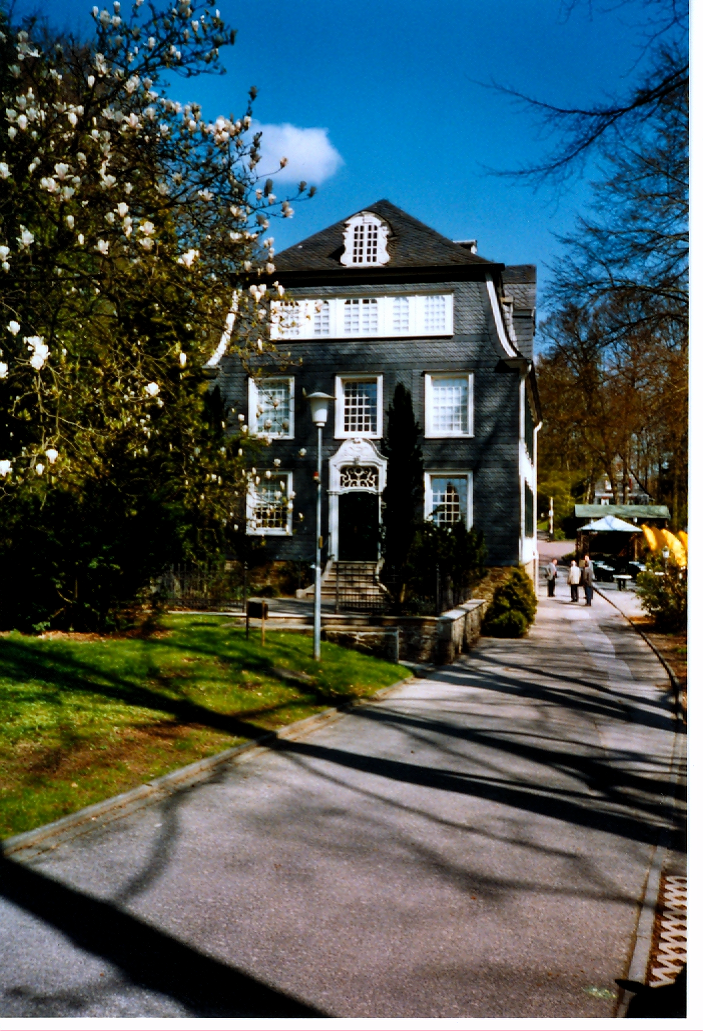 Herrenhaus Große Ledder